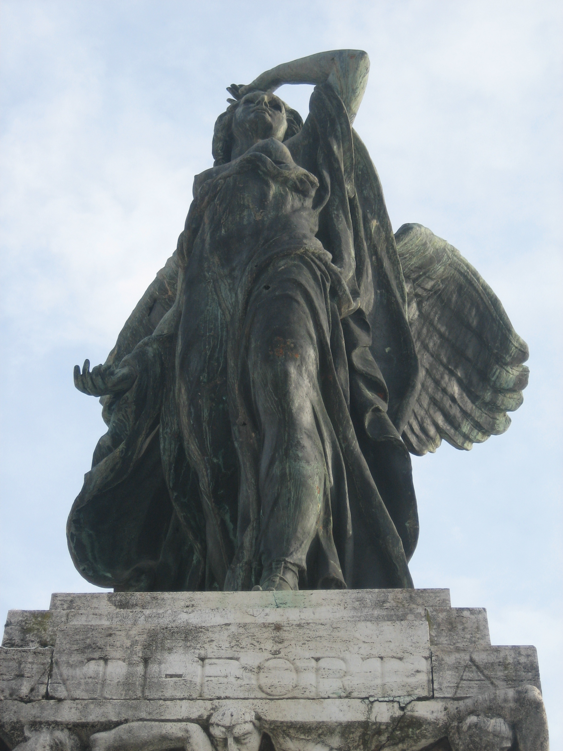 Monumento di Dario Manetti e Carlo Rivalta 1925 This is a photo of a monument which is part of cultural heritage of Italy.